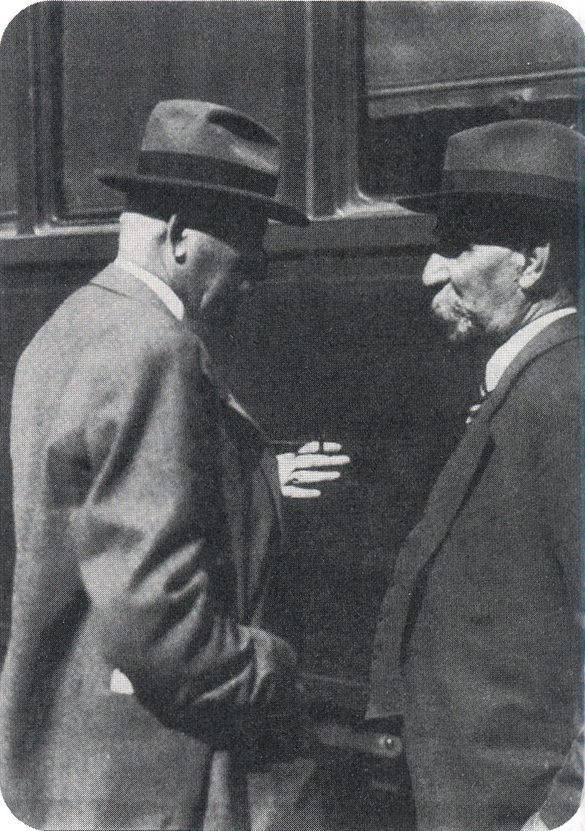 Вътрешният министър Никола Мушанов изпраща министър-председателя Александър Малинов, заминаващ от гара София на сесия на Обществото на народите в Женева